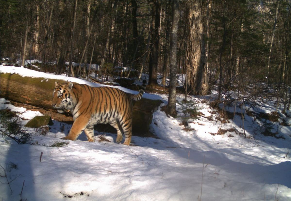 Тигр Заветный. Бастакский заповедник.